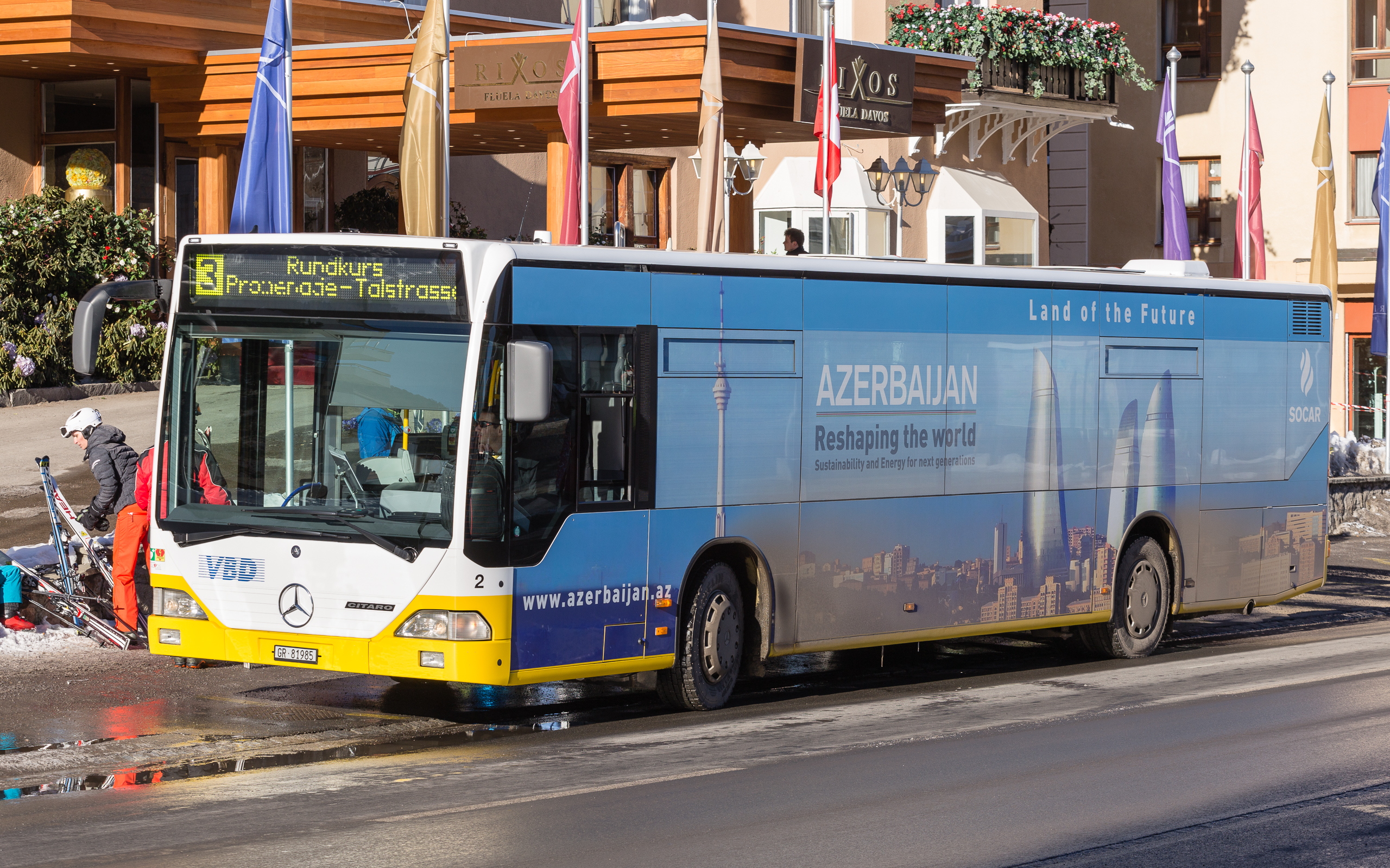 VBD-Bus mit Werbung während des World Econiomic Forums 2014